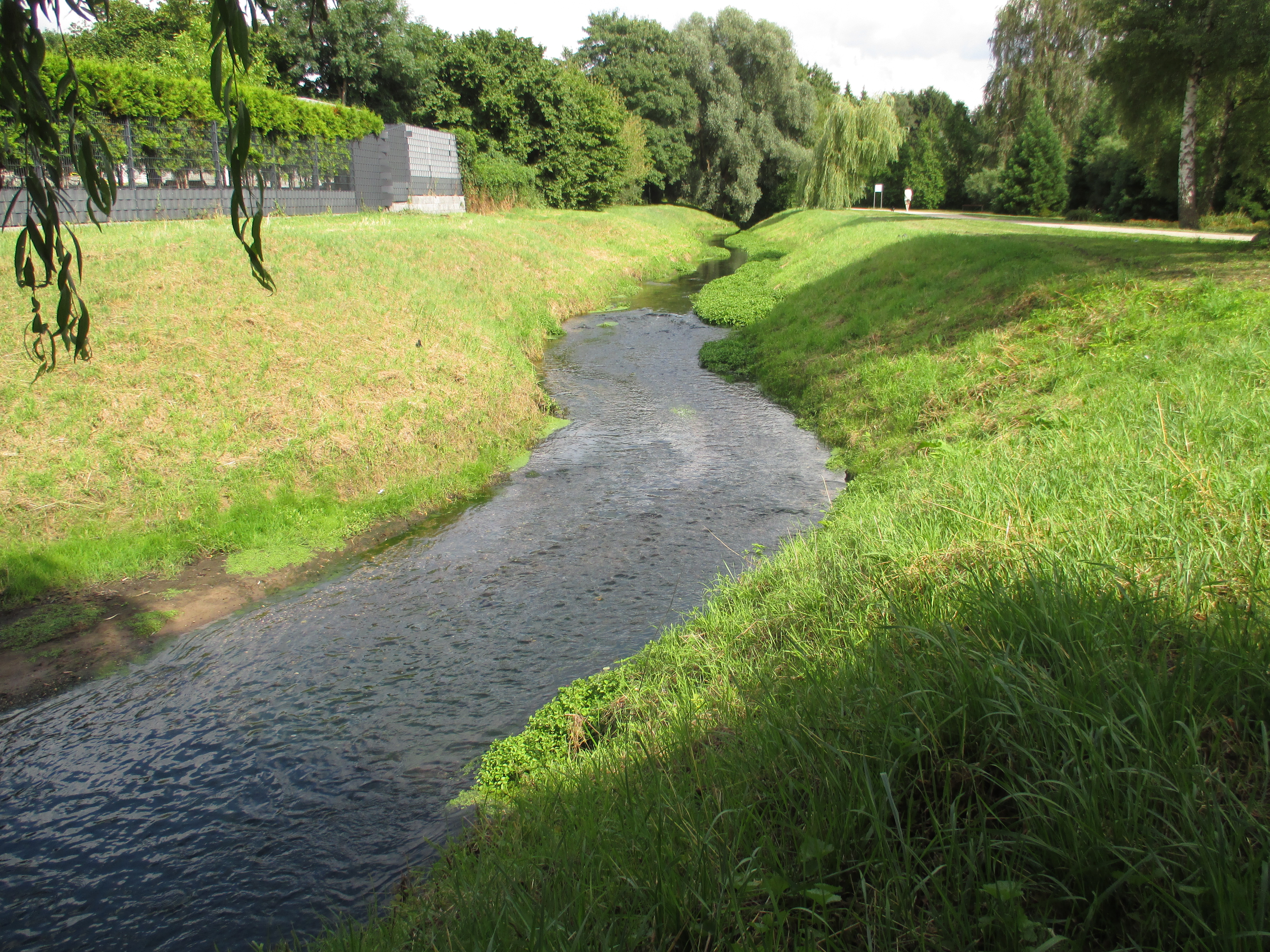 Renaturierter Kanal der Großen Goorley.